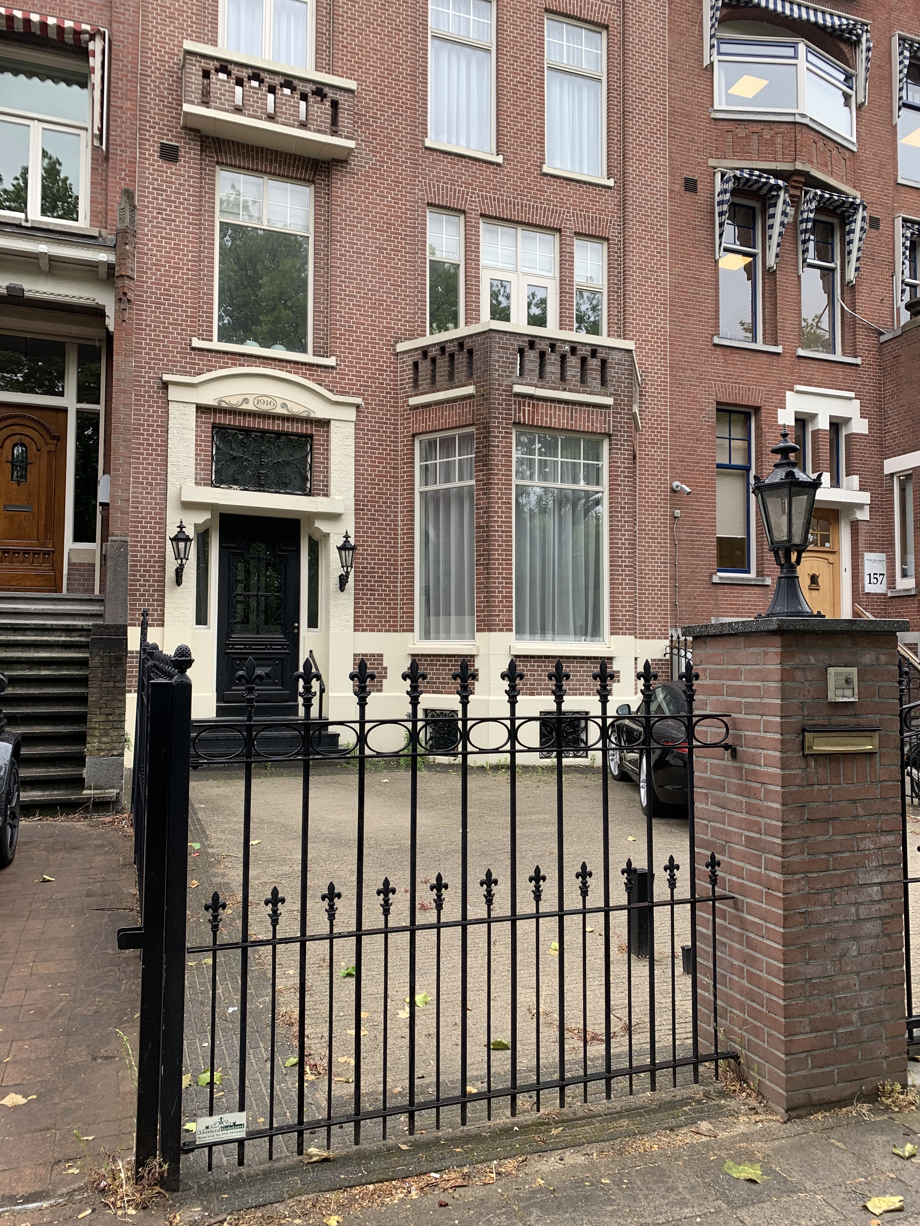 Heemraadsingel 159 te Rotterdam (2020)